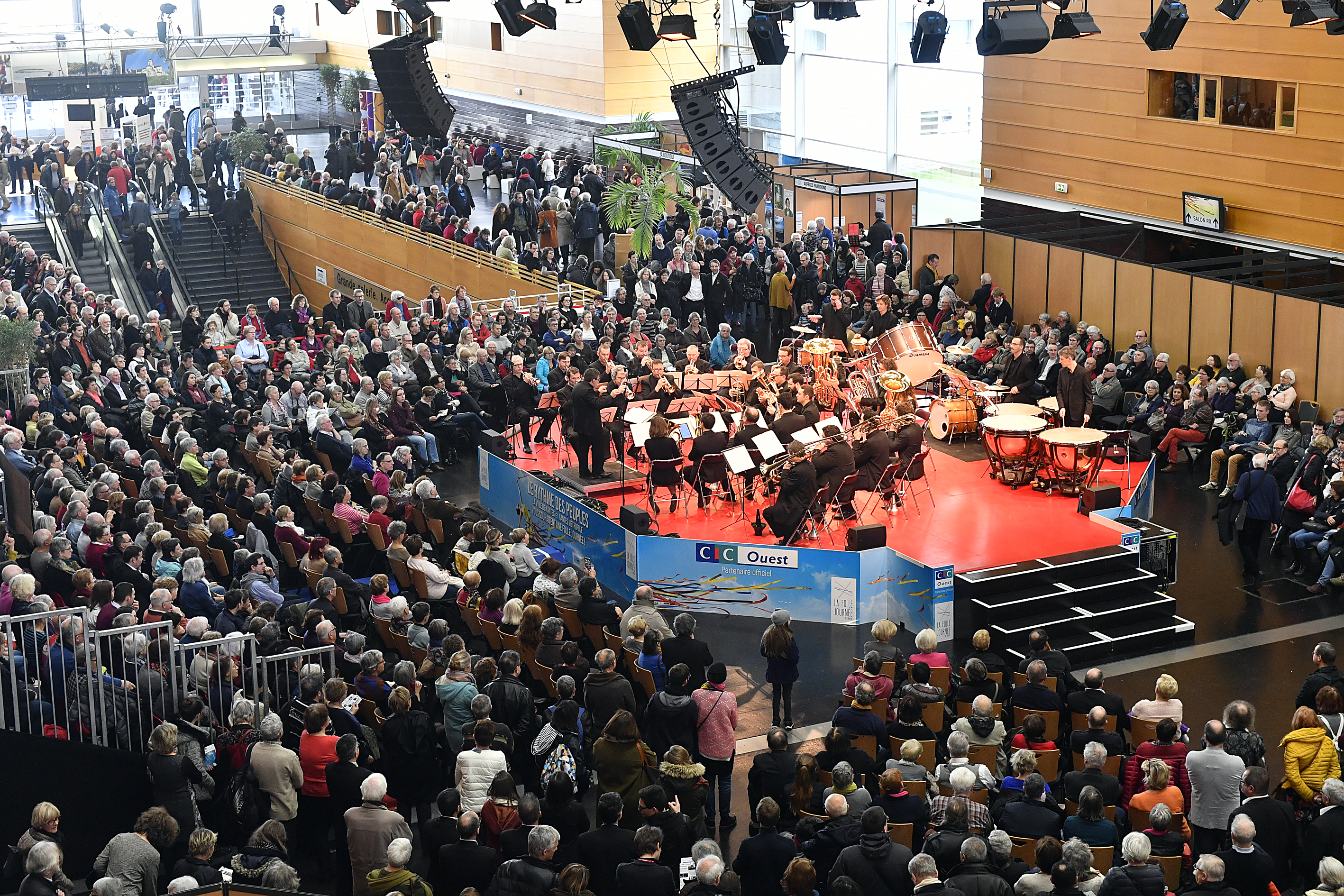 Le Kiosque de La Folle Journée